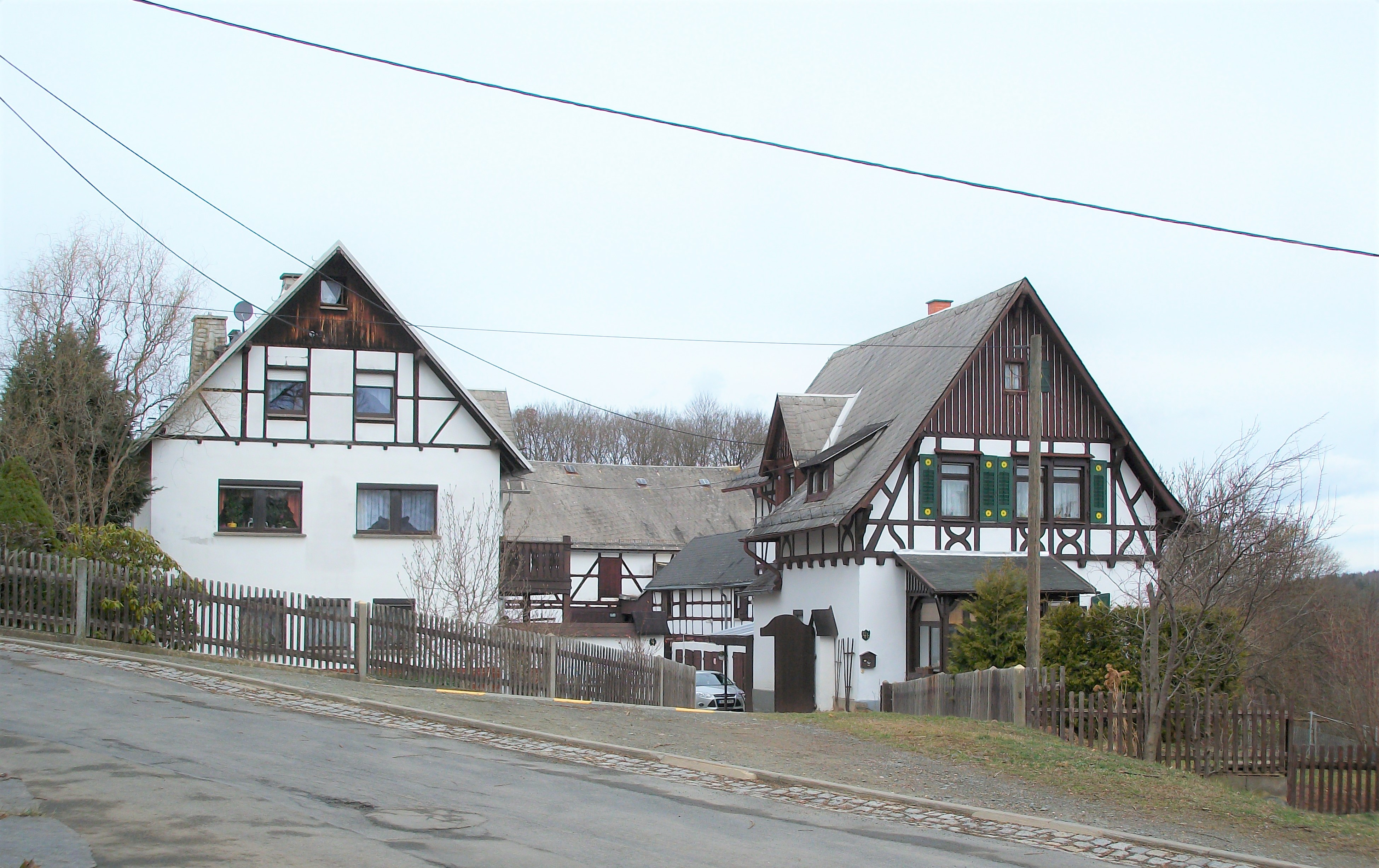 Trieb (Pöhl), Nr. 4b